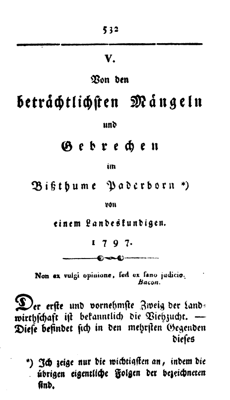 Von den beträchtlichsten Mängeln und Gebrechen im Bißthume Paderborn von einem Landeskundigen. Magazin für Westphalen. 1797